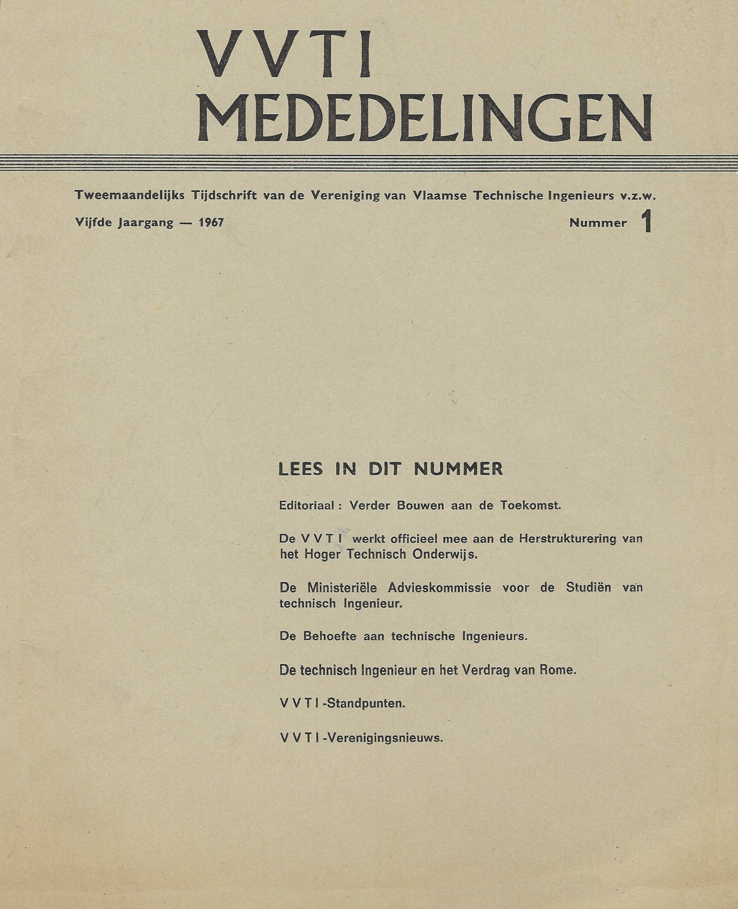 Omslag van de eerste gedrukte uitgave van het tijdschrift van de Vereniging van Vlaamse Technische Ingenieurs (VVTI)